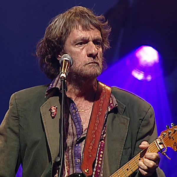 Plume Latraverse à la place des festivals le 14 juin 2012